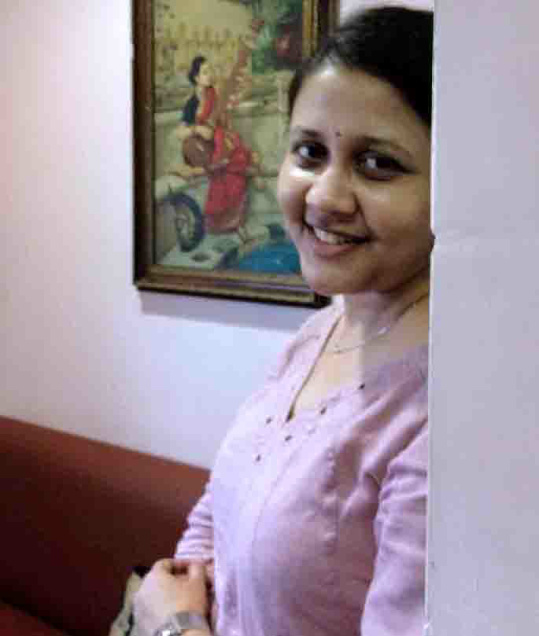 பார்வதி